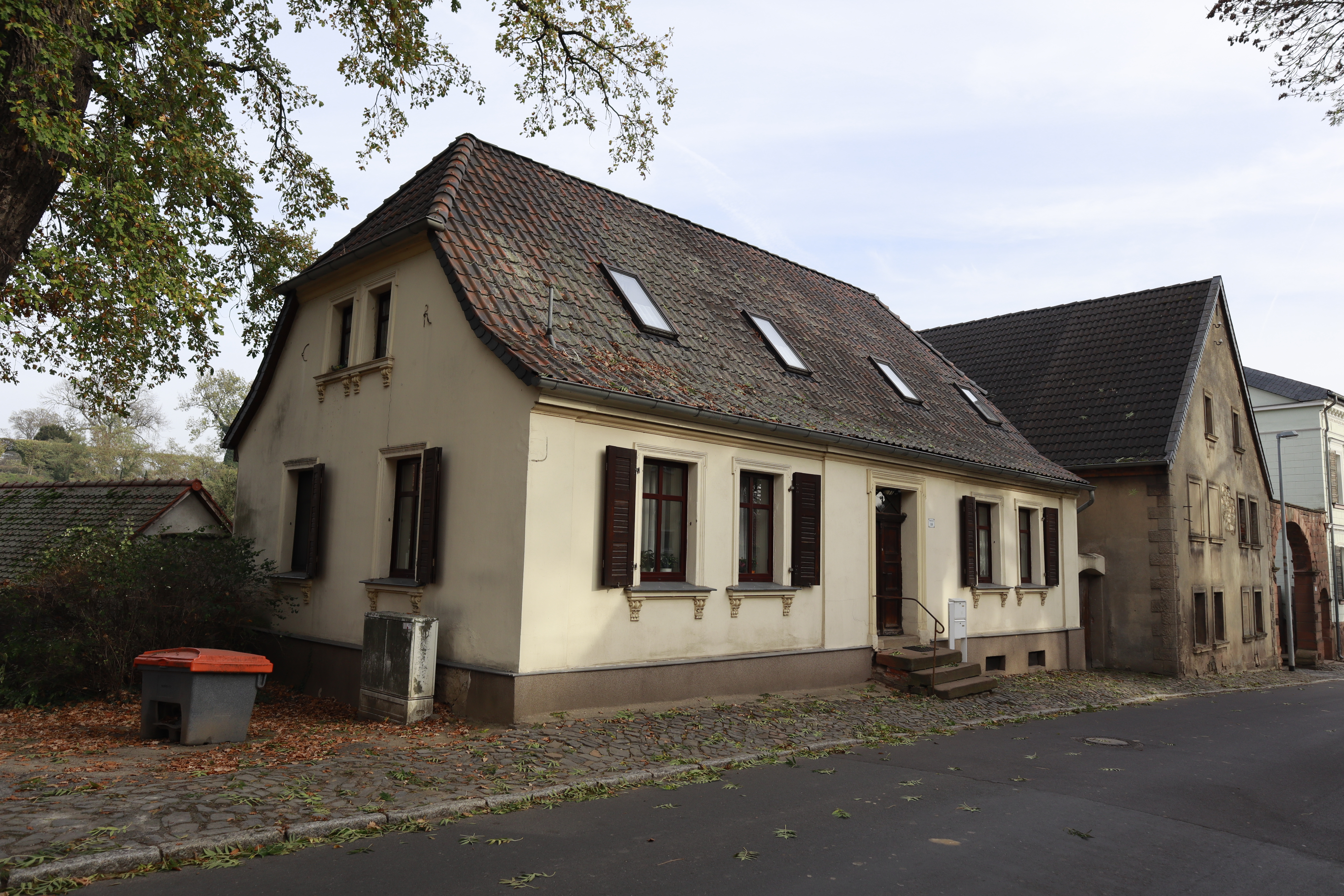 Haupstr. 35 (Hundisburg)